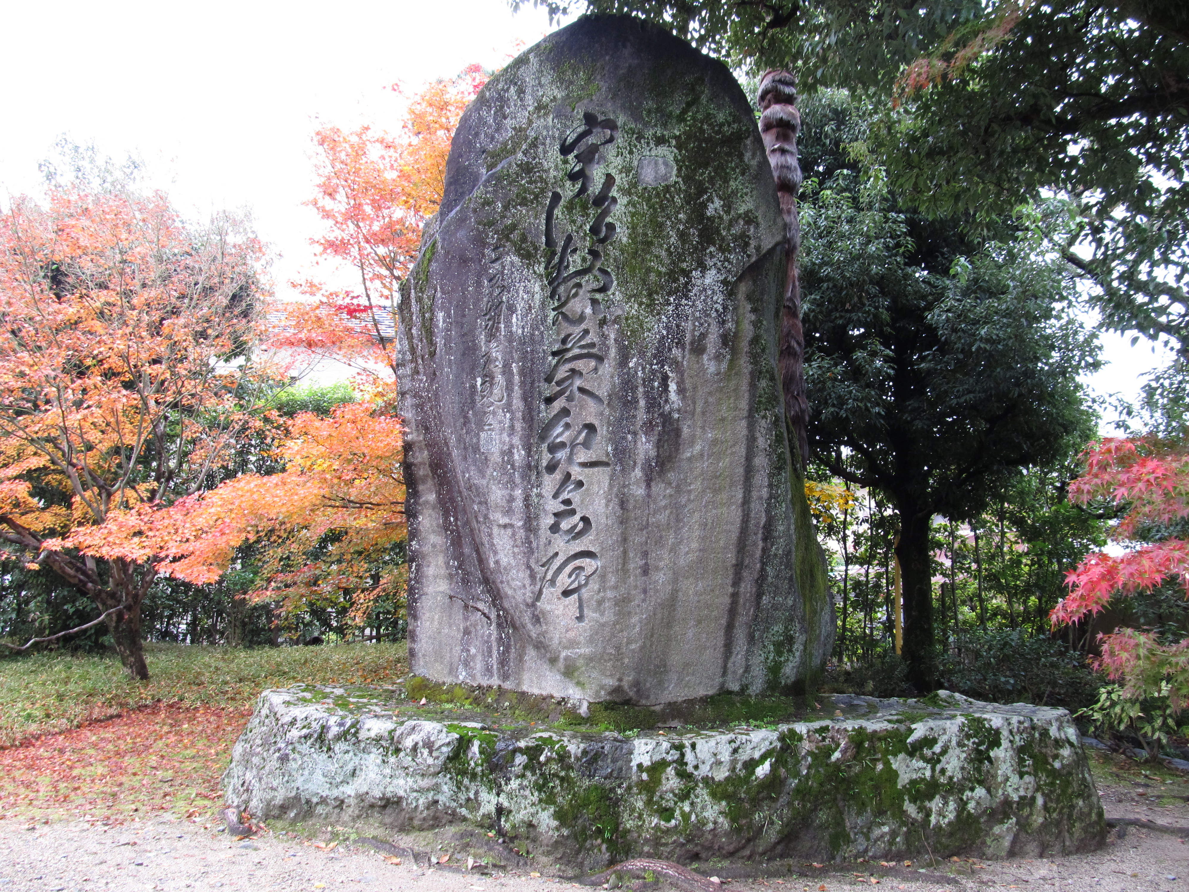 京都府宇治市の平等院正門前にある宇治製茶紀念碑。